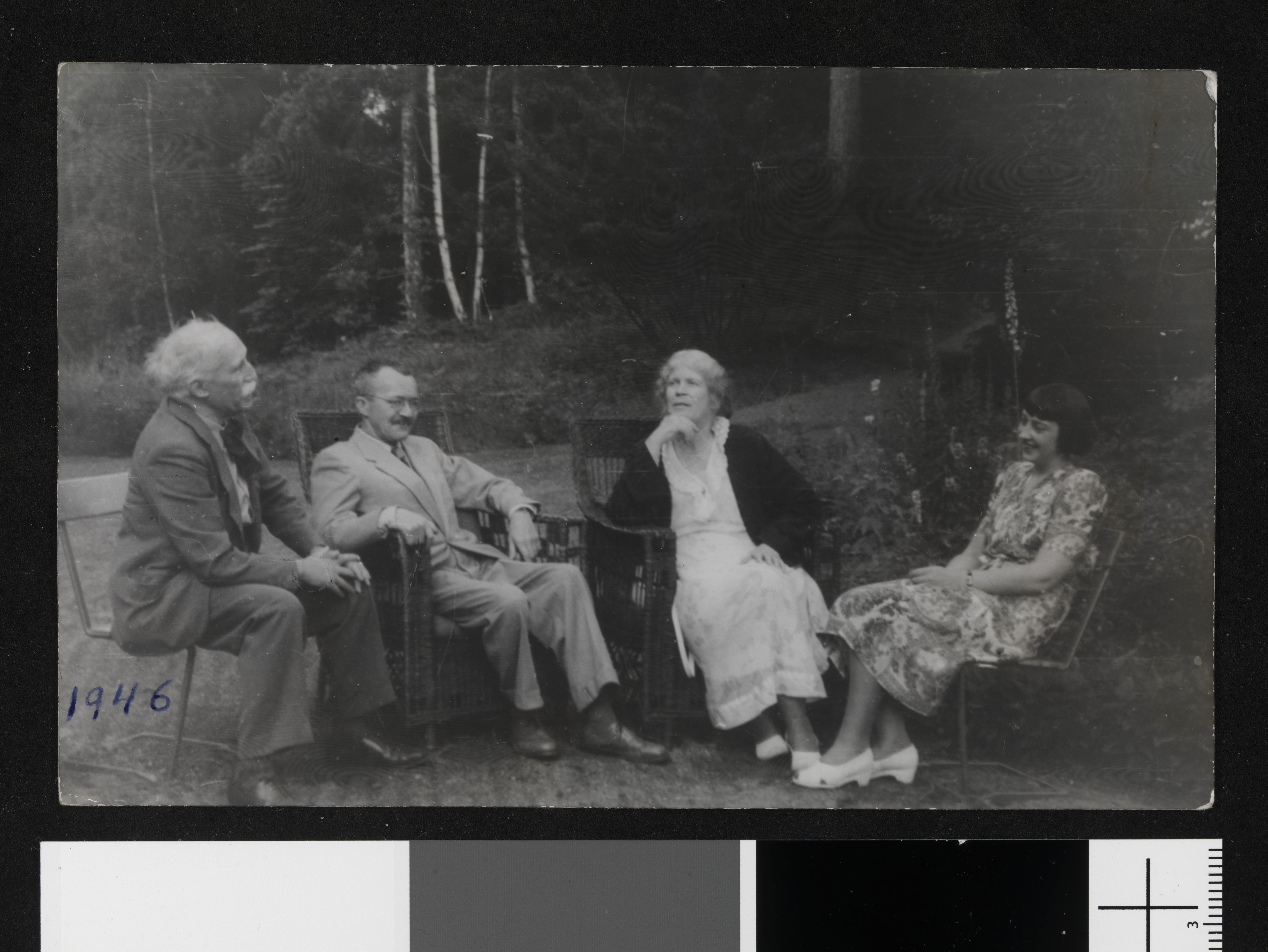 Bildet er hentet fra Nasjonalbibliotekets bildesamling. Anmerkninger til bildet var: Postkortet har tilhørt Bjørn Bjørnson (1899-1986). Depicted person: Øverland, Arnulf Depicted person: Posse-Brazdova, Amelie Depicted person: Bjerre, Poul Carl